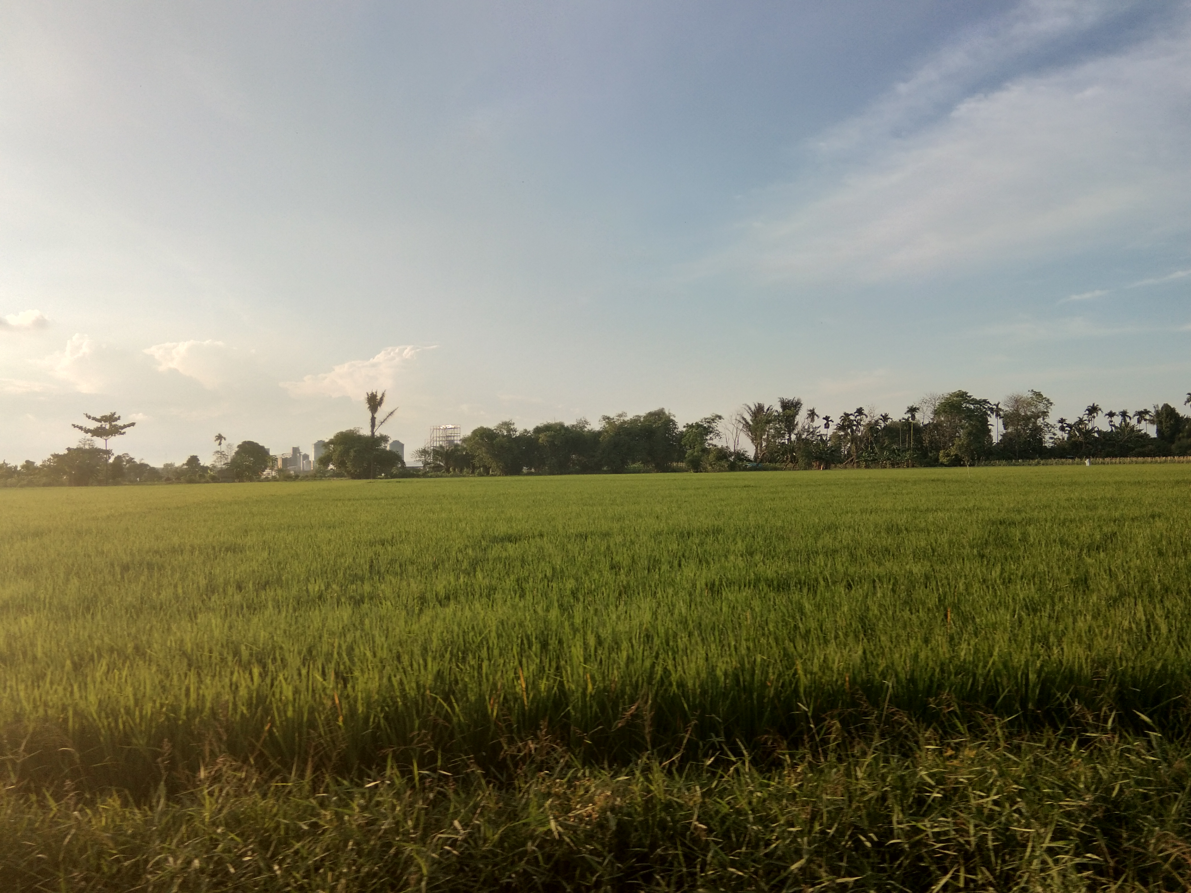 Areal Persawahan di Sampali - 2018